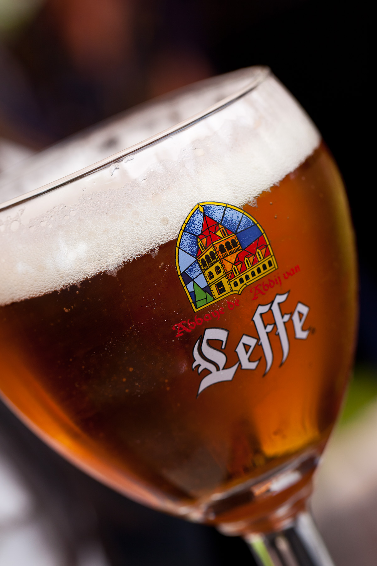 Nice